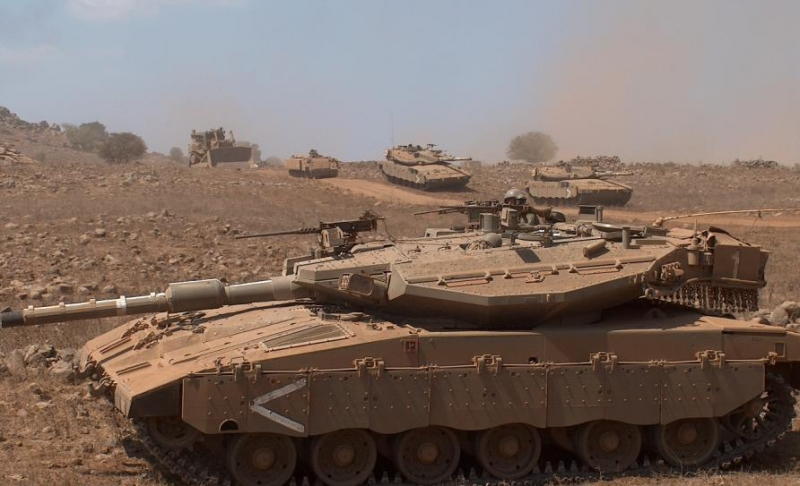 Ground forces, Caterpillar D9 bulldozer and Merkava MkIII Baz tanks of Armoured Brigade 188 כוחות קרקע, דחפור די-9 וטנקי מרכבה סימן 3 ב"ז בתרגיל חטיבת של עוצבת ברק - חטיבה 188